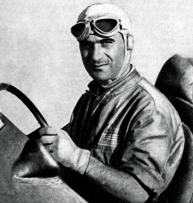 photo from magazine Radiocorriere (1954)